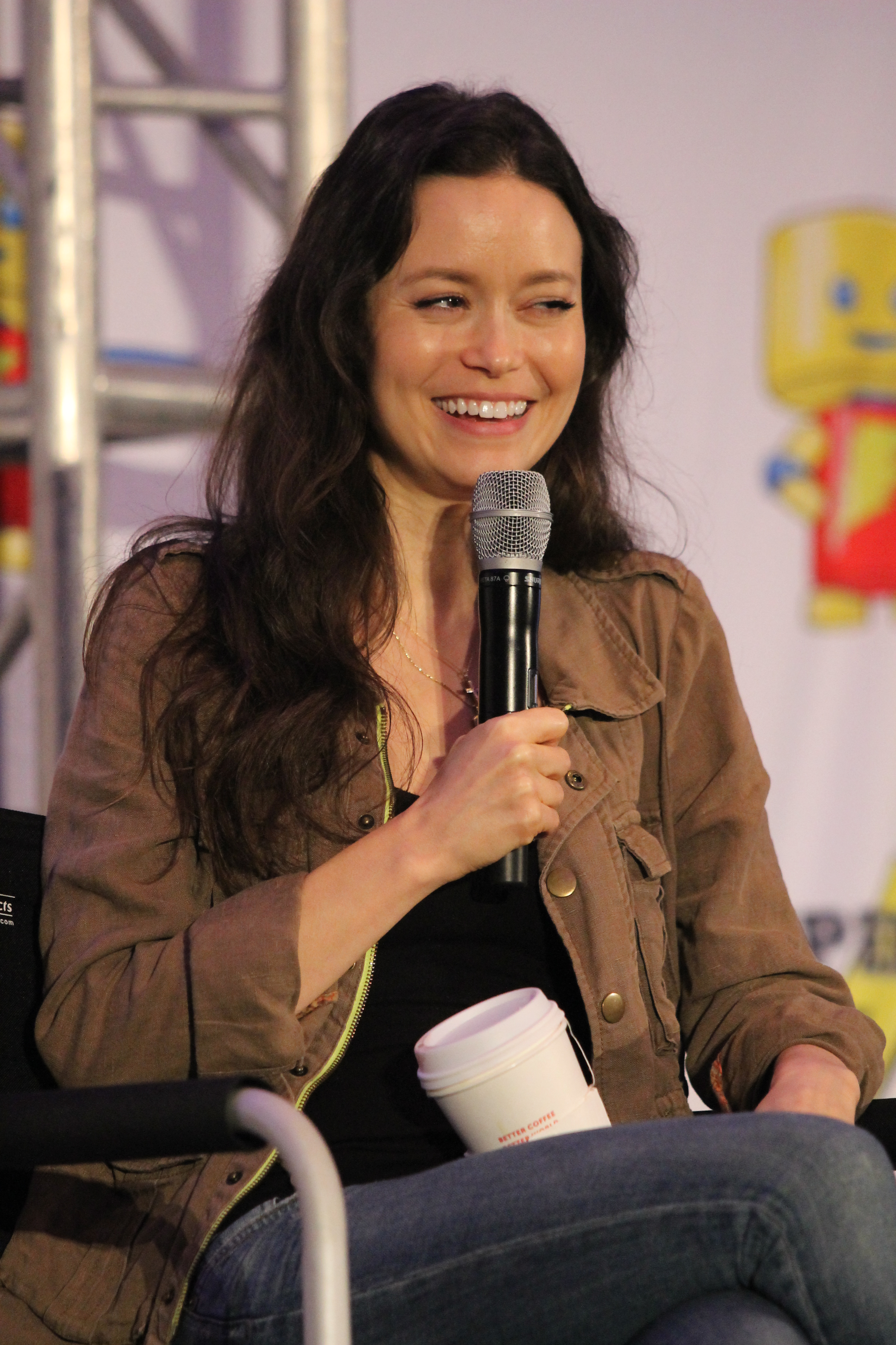 Summer_Glau in Comic Con